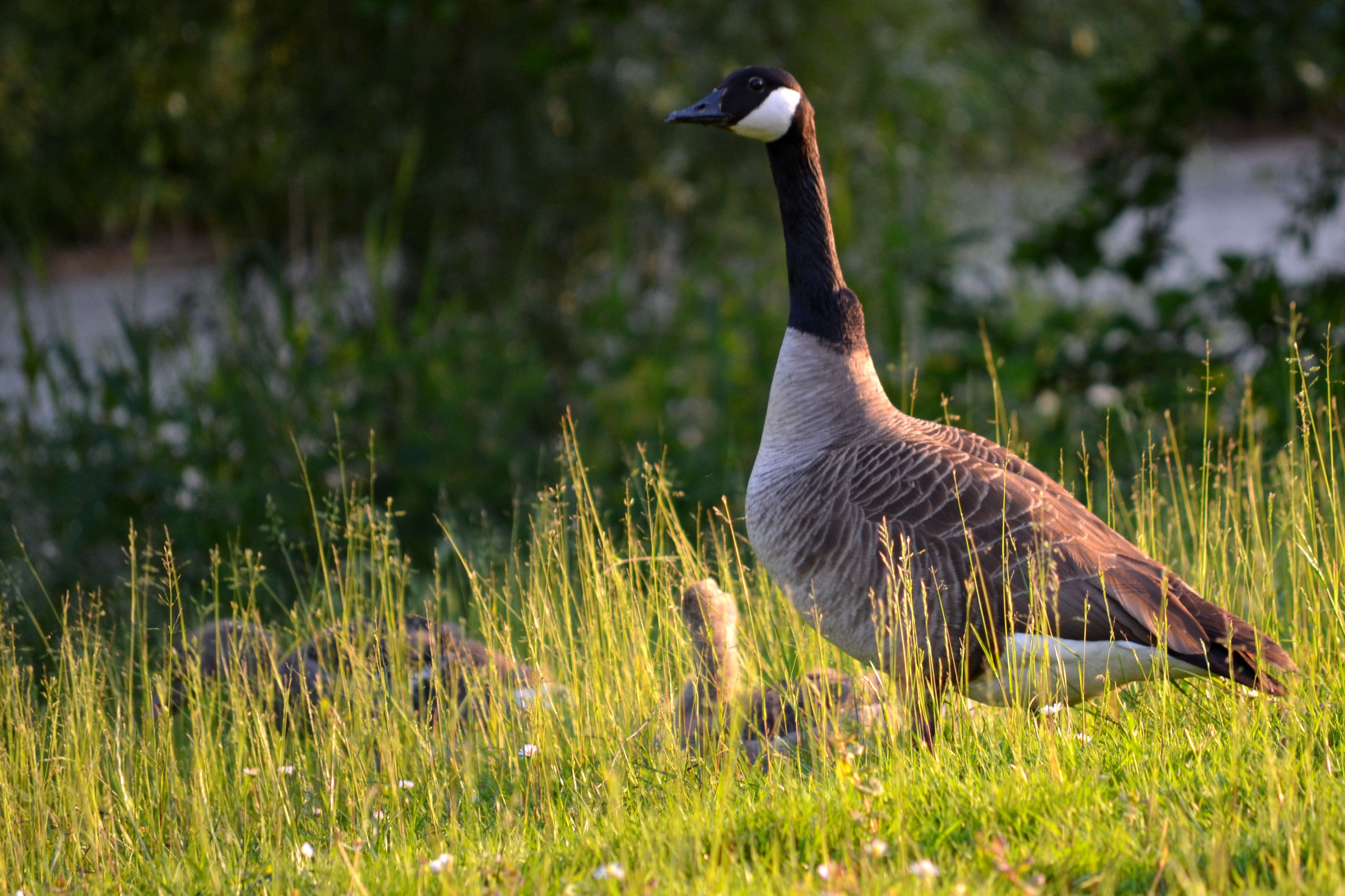 Adult + juvenile